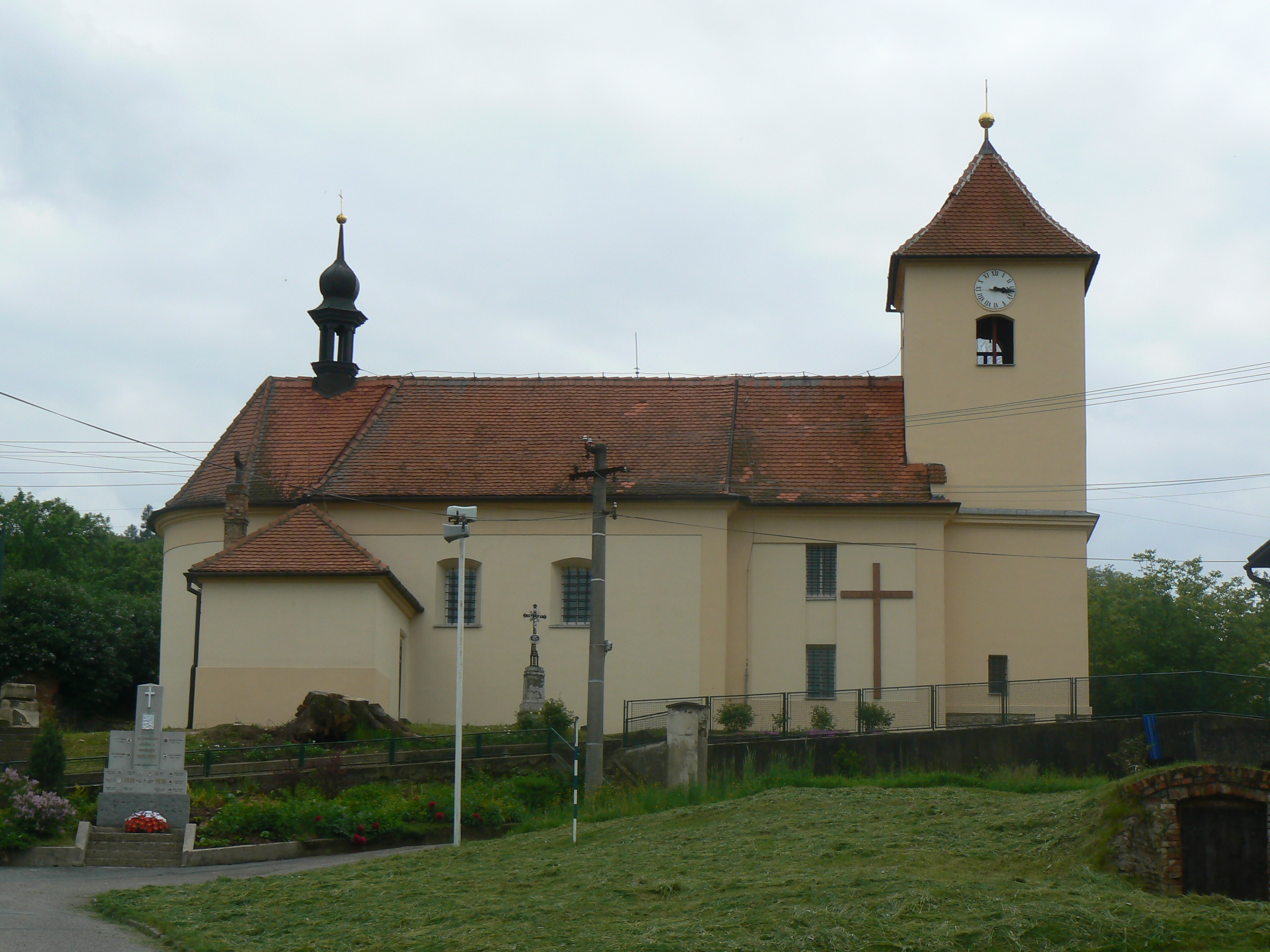 Kostel svatého Mikuláše v Nevojicích, okres Vyškov.